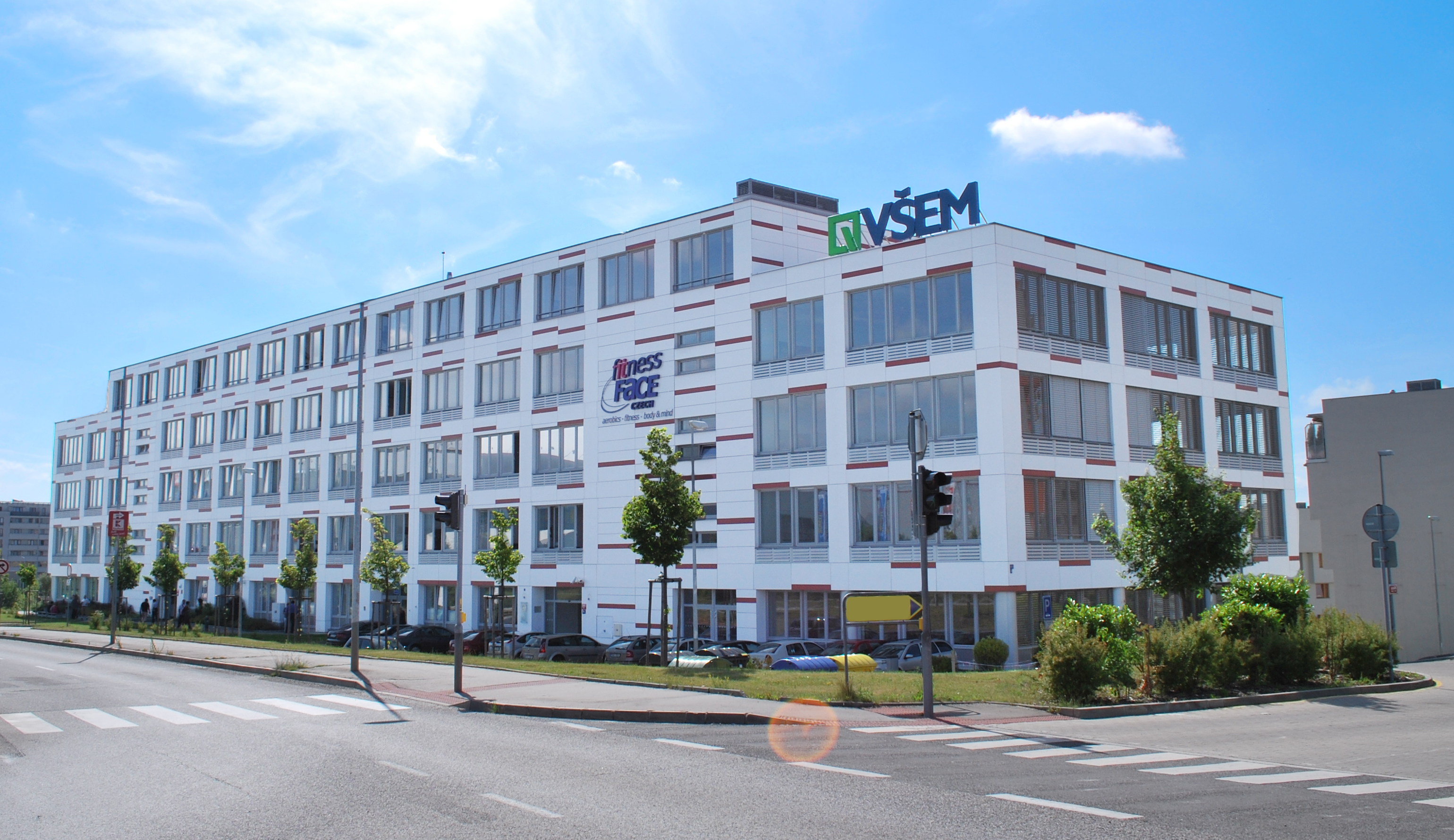 Vysoká škola ekonomie a managementu, Nárožní 2600/9a, Praha 5-Stodůlky.